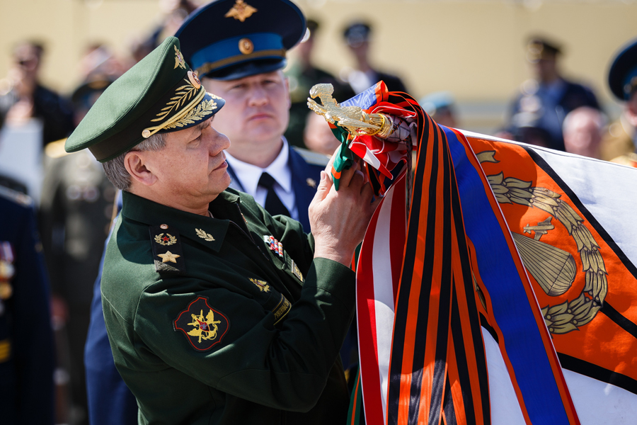 Вручение ордена Суворова 7-й гвардейской десантно-штурмовой (горной) дивизии